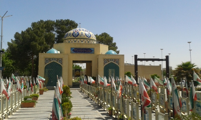 گنبد و بارگاه آیت الله اشرفی اصفهانی در گلستان شهدای اصفهان